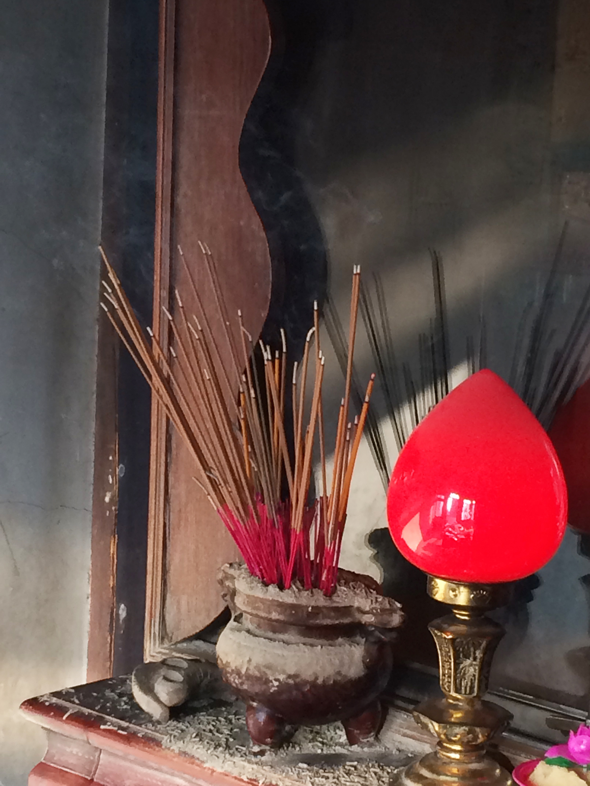 辭年儀式，尪架桌（放置神佛尊像、祖先神主牌的祭桌）上的香爐與神明燭。